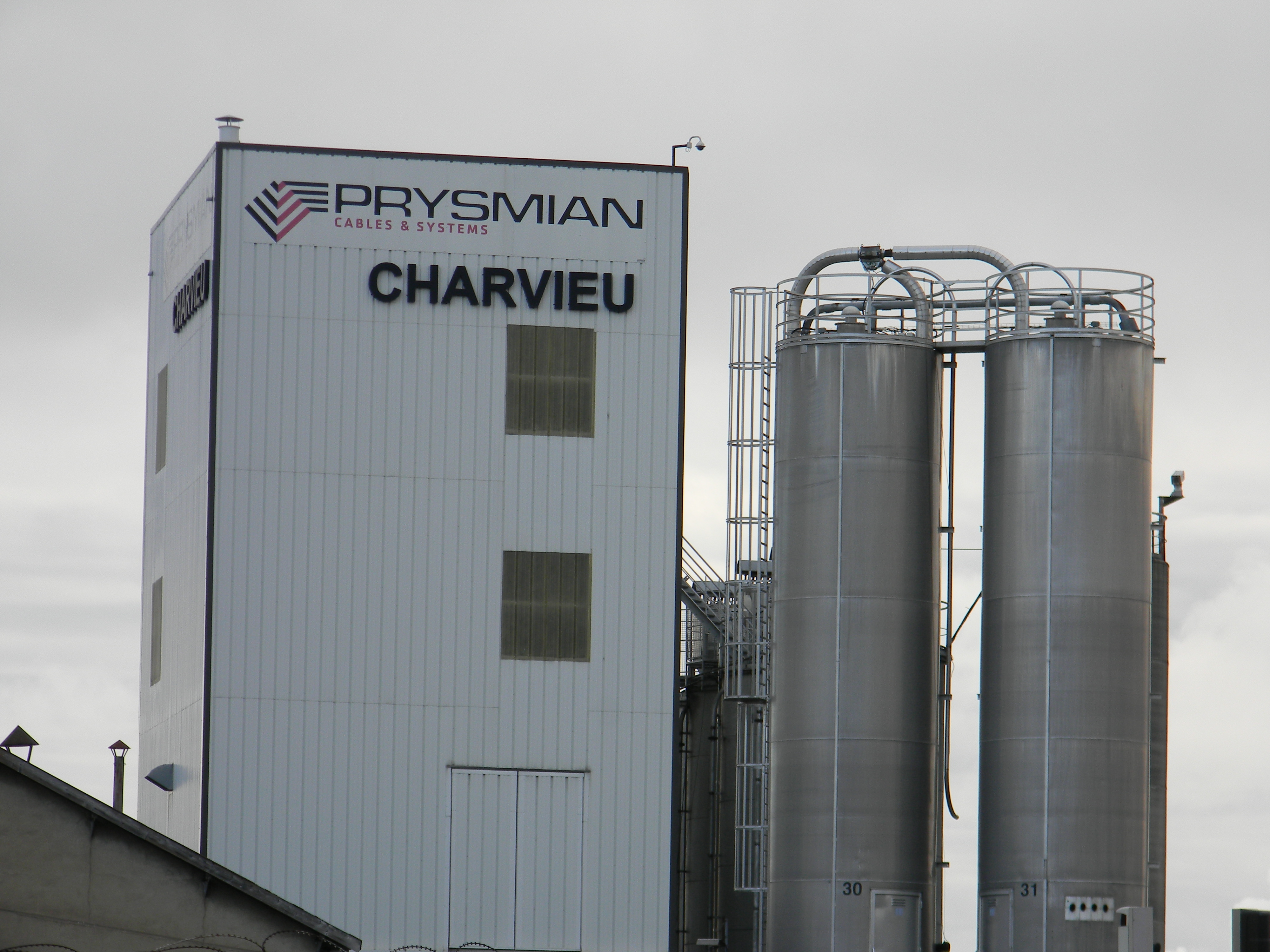 L'usine Prysmian à Charvieu.